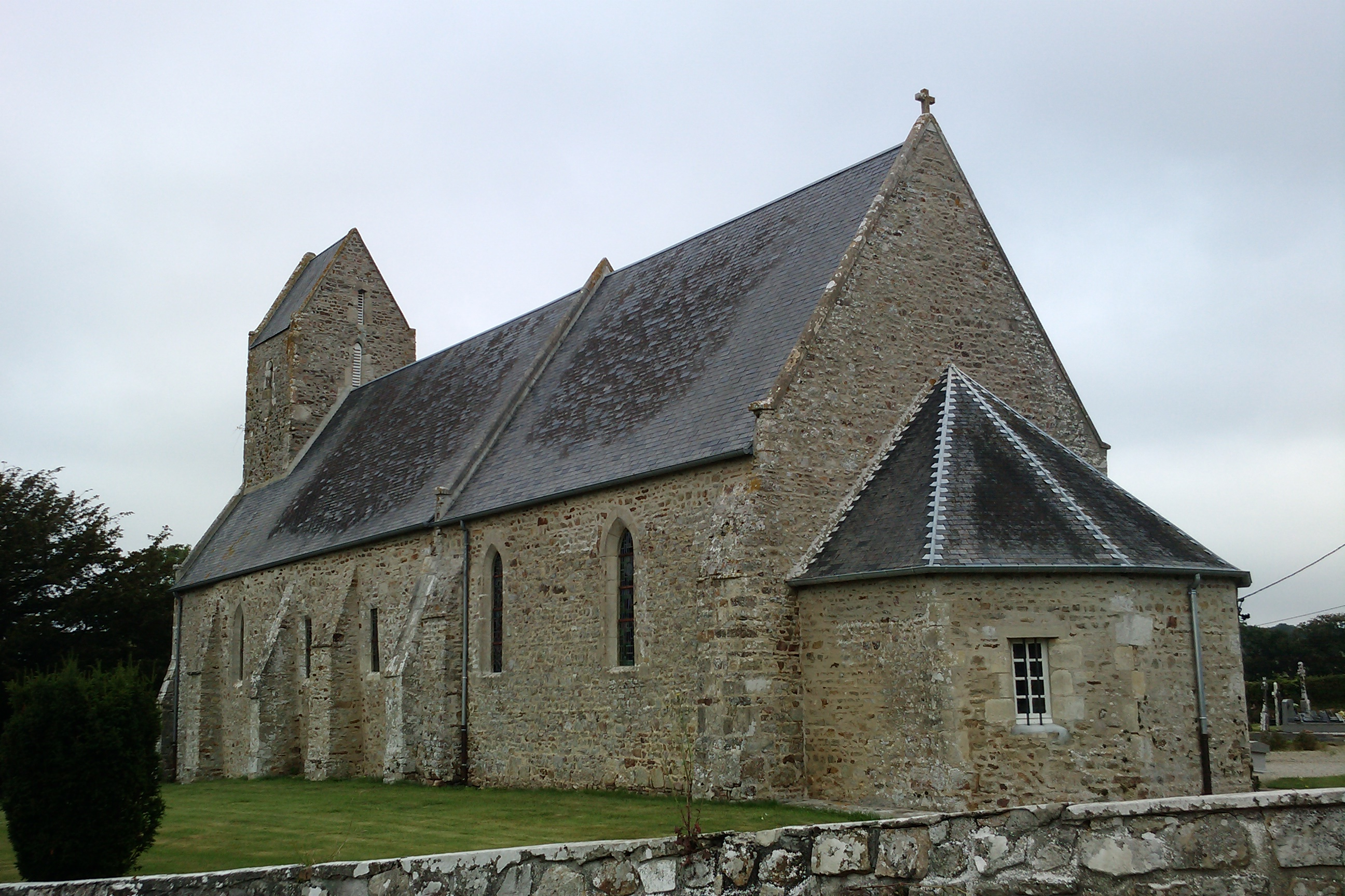 Gerville-la-Forêt, commune associé à Vesly (Manche)